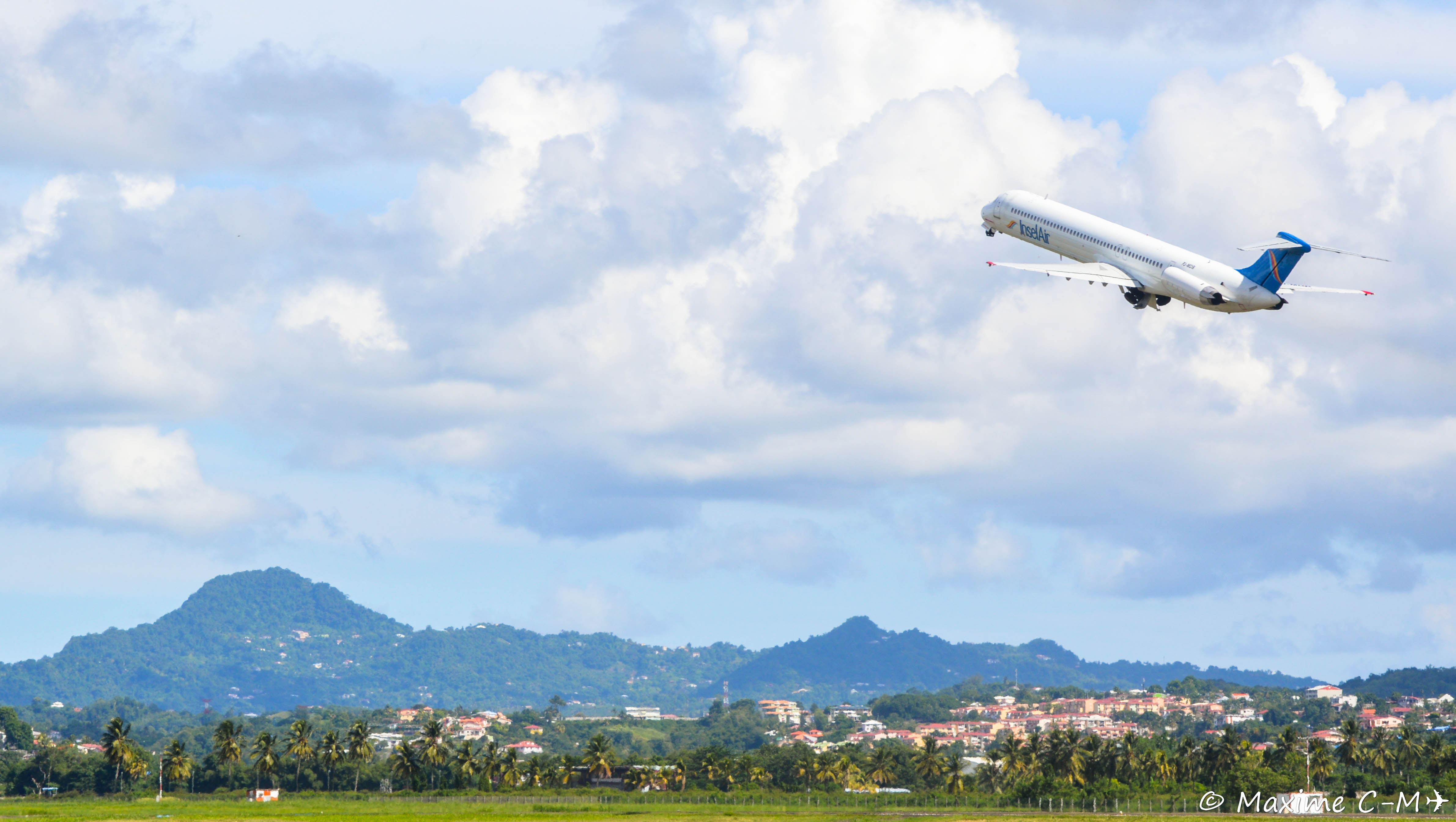 Insel Air